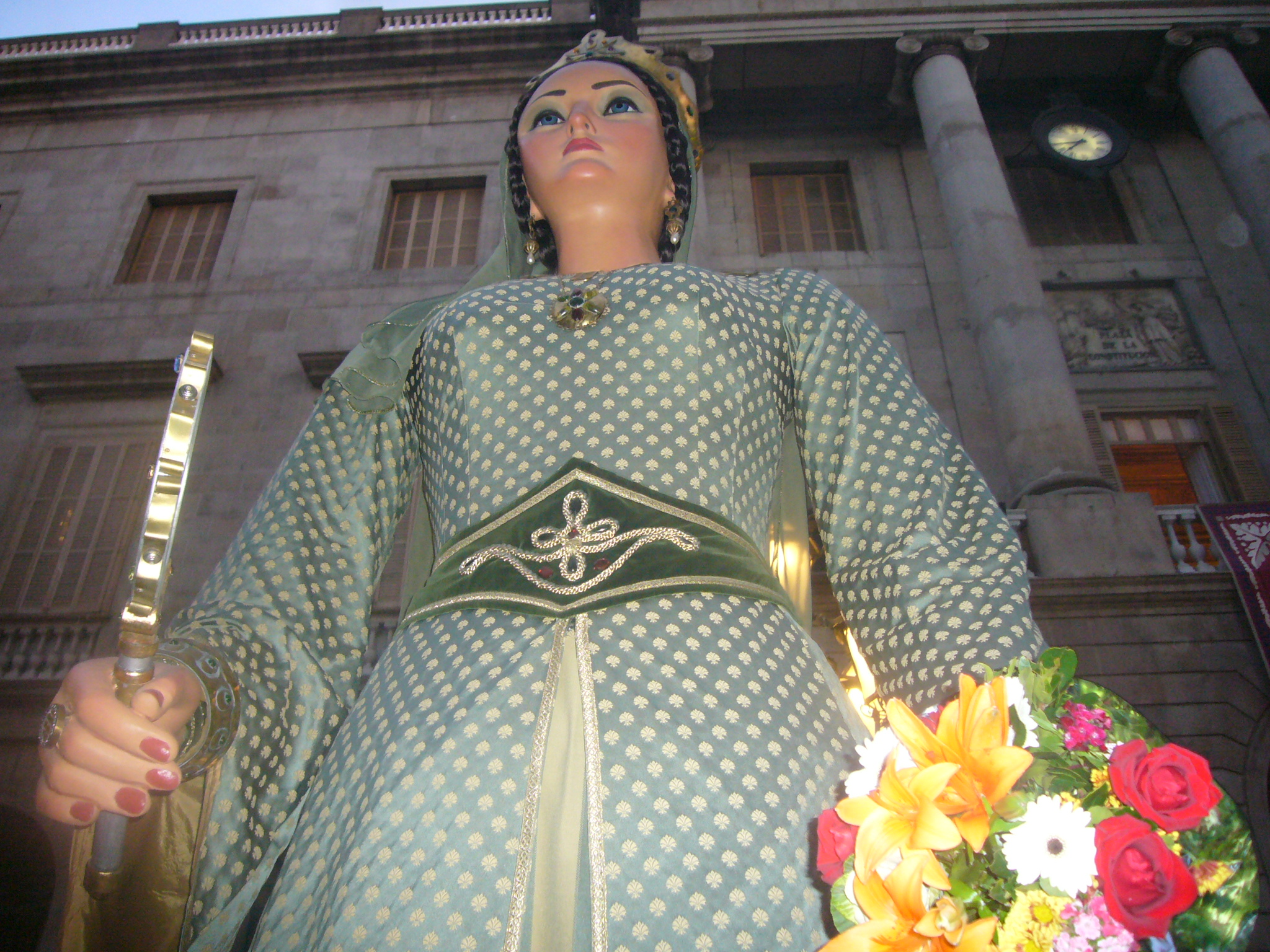 Geganta de Barcelona - Violant d'Hongria